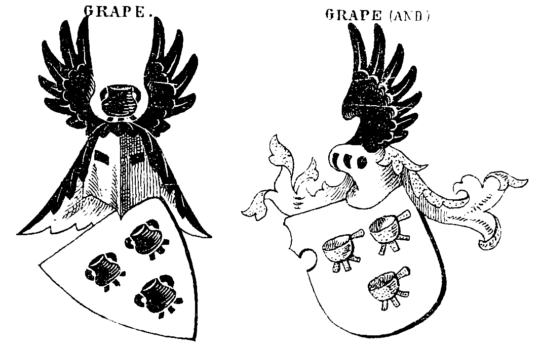 Wappenvarianten der von Grape